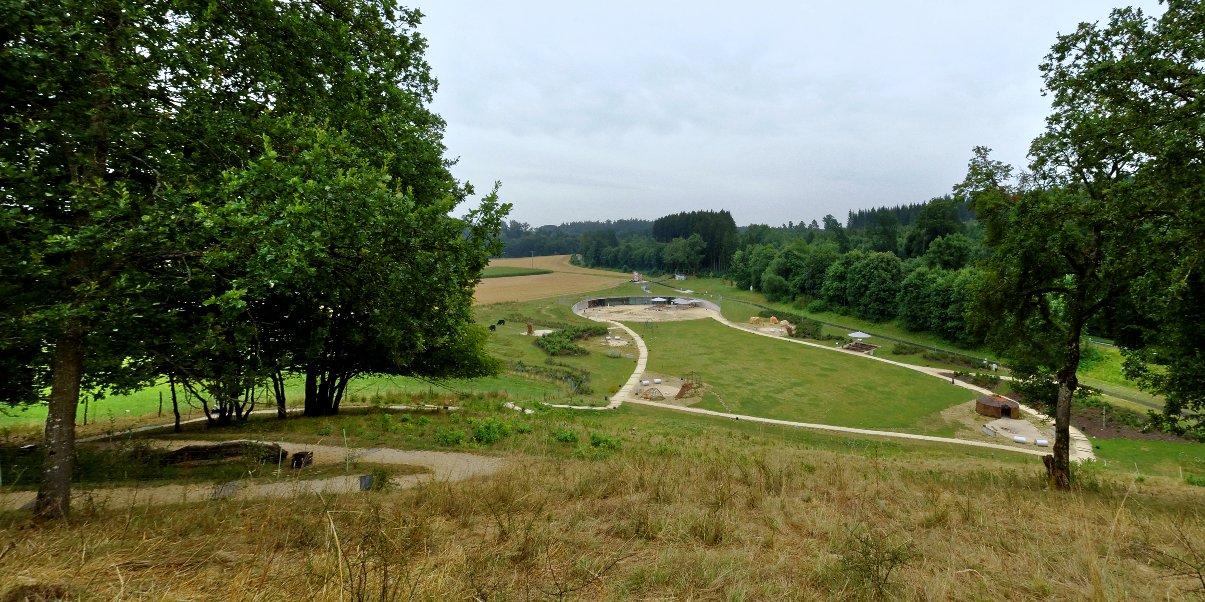 Der Archäopark Vogelherd an der Vogelherdhöhle auf der Schwäbischen Alb.